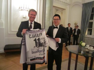 Martin Hyun überreicht dem Bundespräsidenten Christian Wulff ein Trikot seiner Hockey is Diversity Initiative